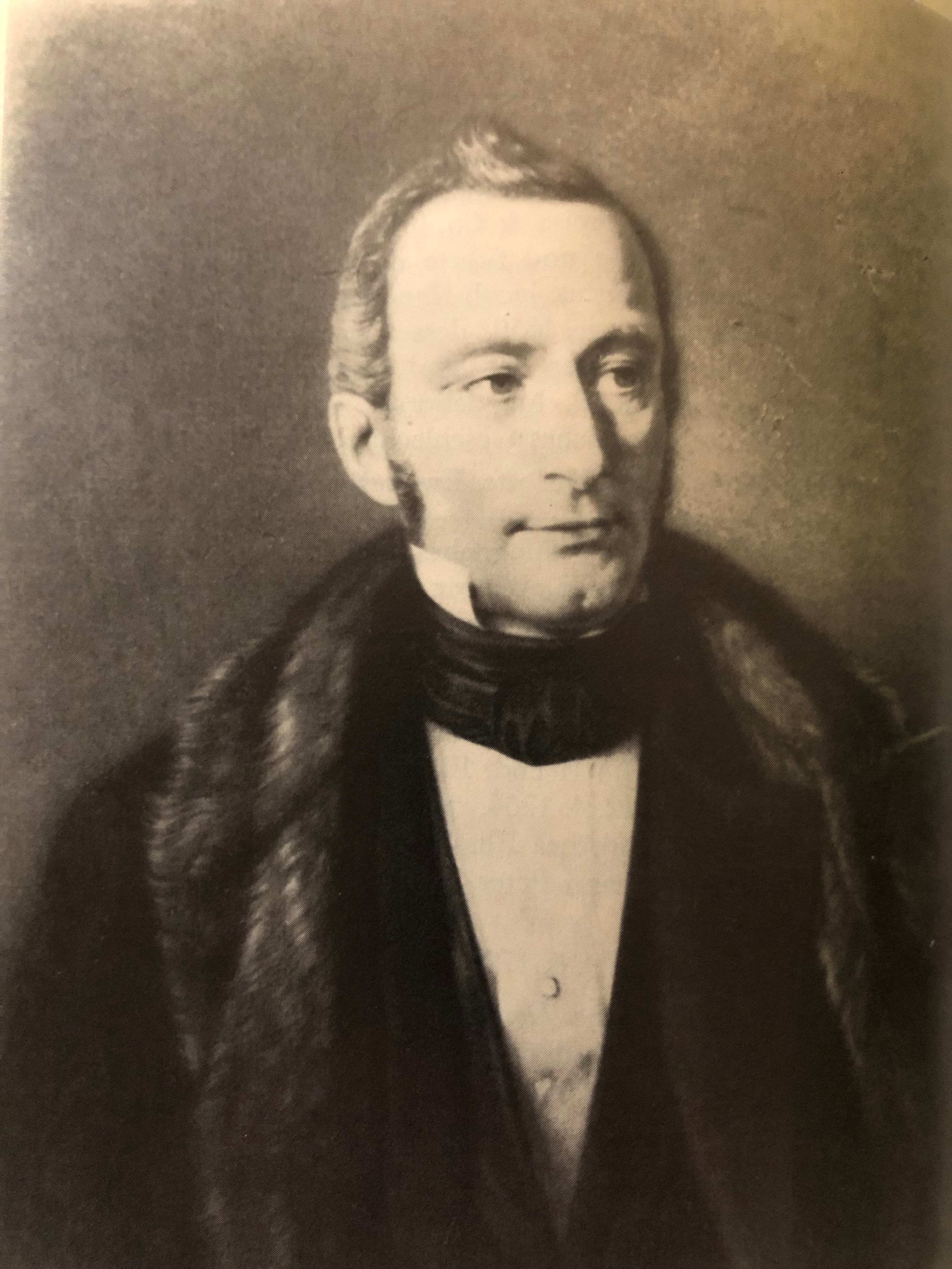 Foto aus Merkschen Familien-Zeitschrift Band XXIV - 1971 - Seite 118 Herausgeber Peter Merck - 6146 Alsbach - gleiches Foto nur seitenverkehrt wie in der Biografie im Magdeburger Biografischen Lexikon (siehe Weblinks)